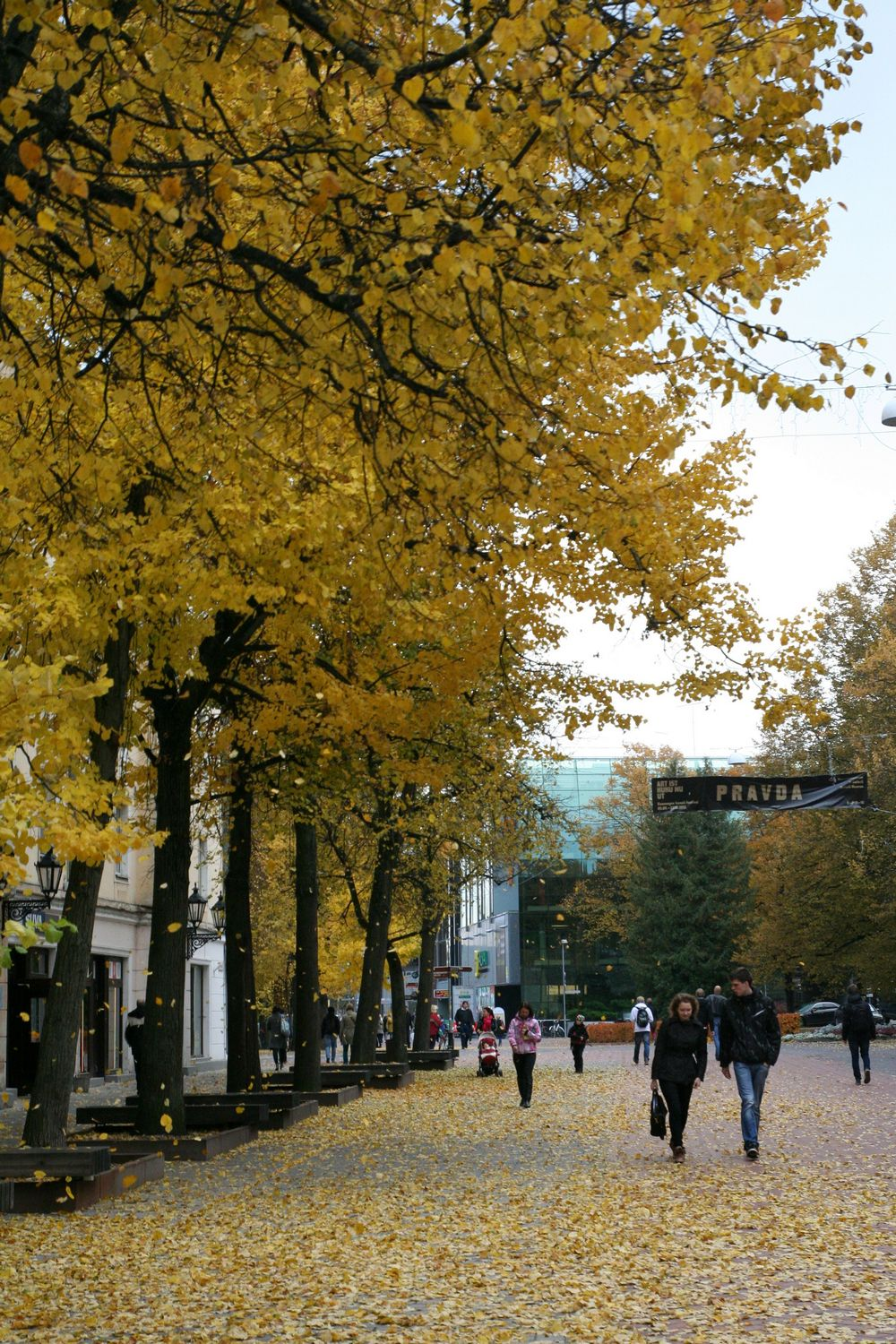 Küüni tänav.